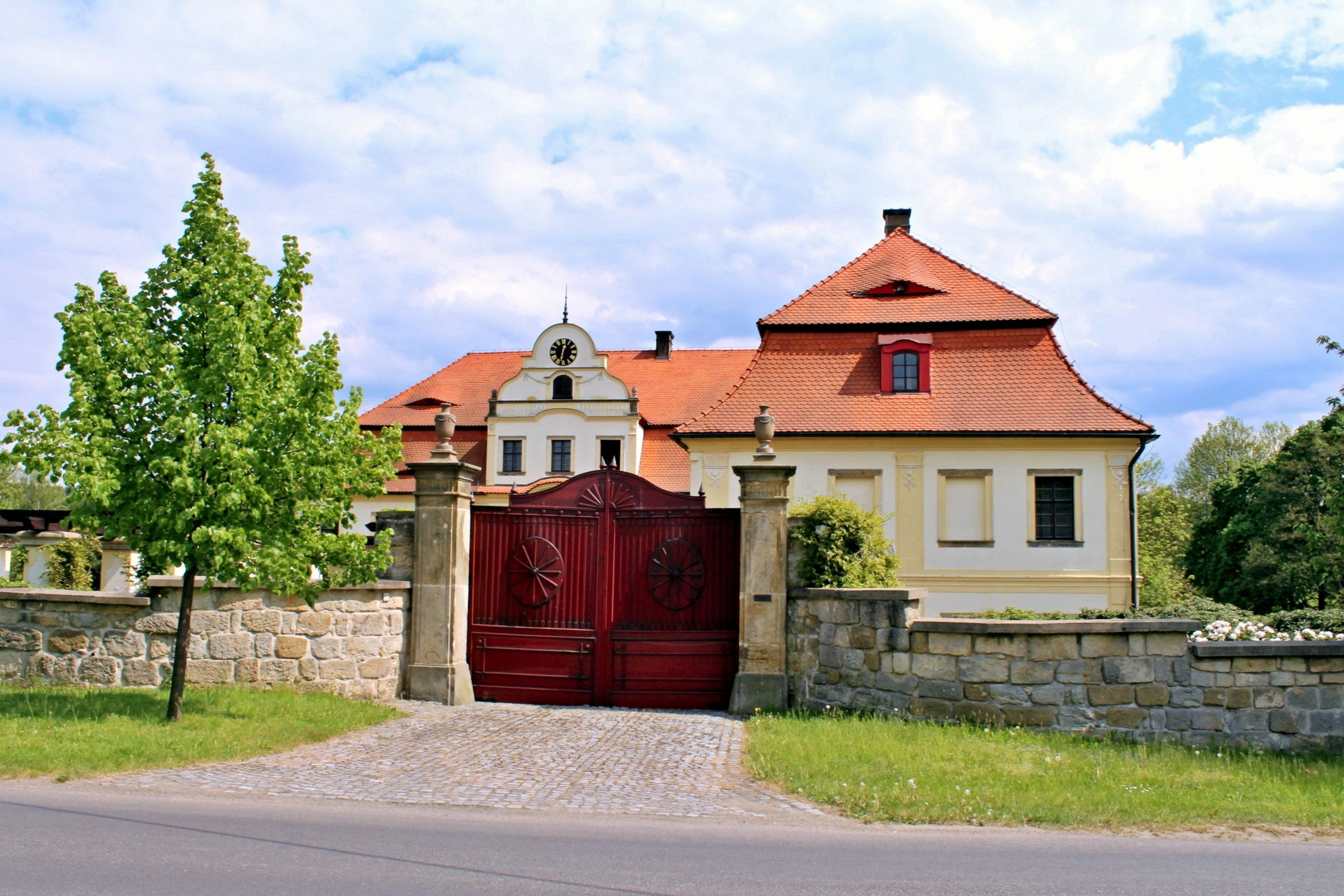 Palmeho dvůr v Jablonném-Markvarticích